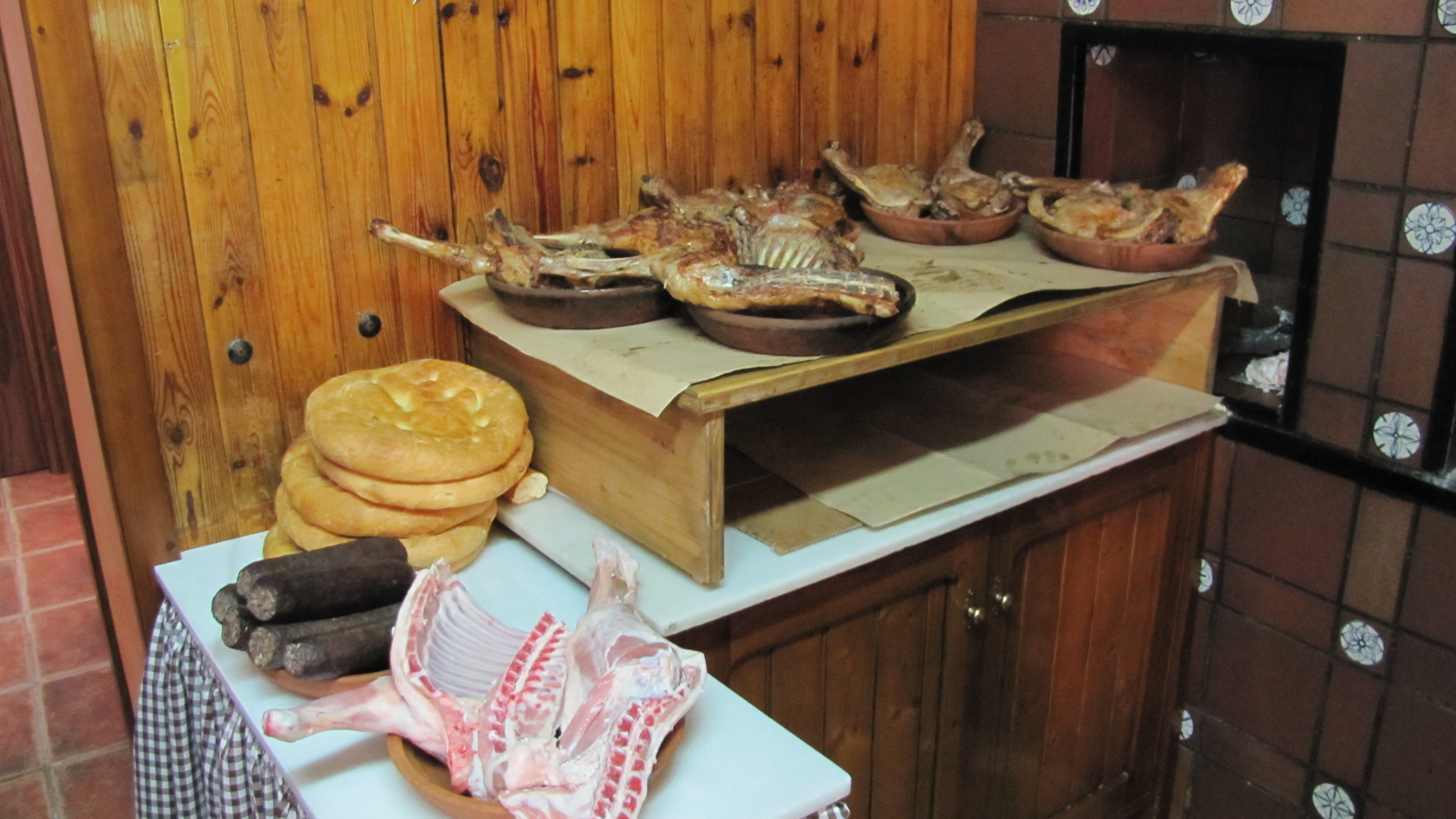 En la fotografía están los platos tradiciones de Aranda de Duero y de la comarca de la Ribera del Duero (España). La torta de Aranda, el pan tradicional de la localidad, la Morcilla de Aranda, la variedad local de la Morcilla de Burgos, y varios cuartos de lechazo asado, cordero asado, todos ellos en cuencos de barro, ademas de un par más sin asar todavía. La fotografía está tomada en el Asador Rafael Corrales de Aranda de Duero (Burgos), el más antiguo de la ciudad, fundado en 1902.